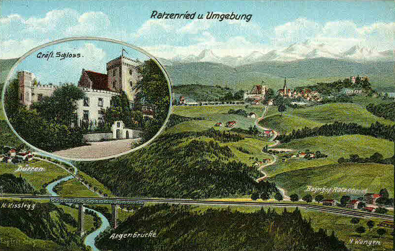 Ansichtskarte von Eugen Felle; Technoseum (Landesmuseum für Technik und Arbeit Mannheim) Motiv: Ratzenried und Umgebung